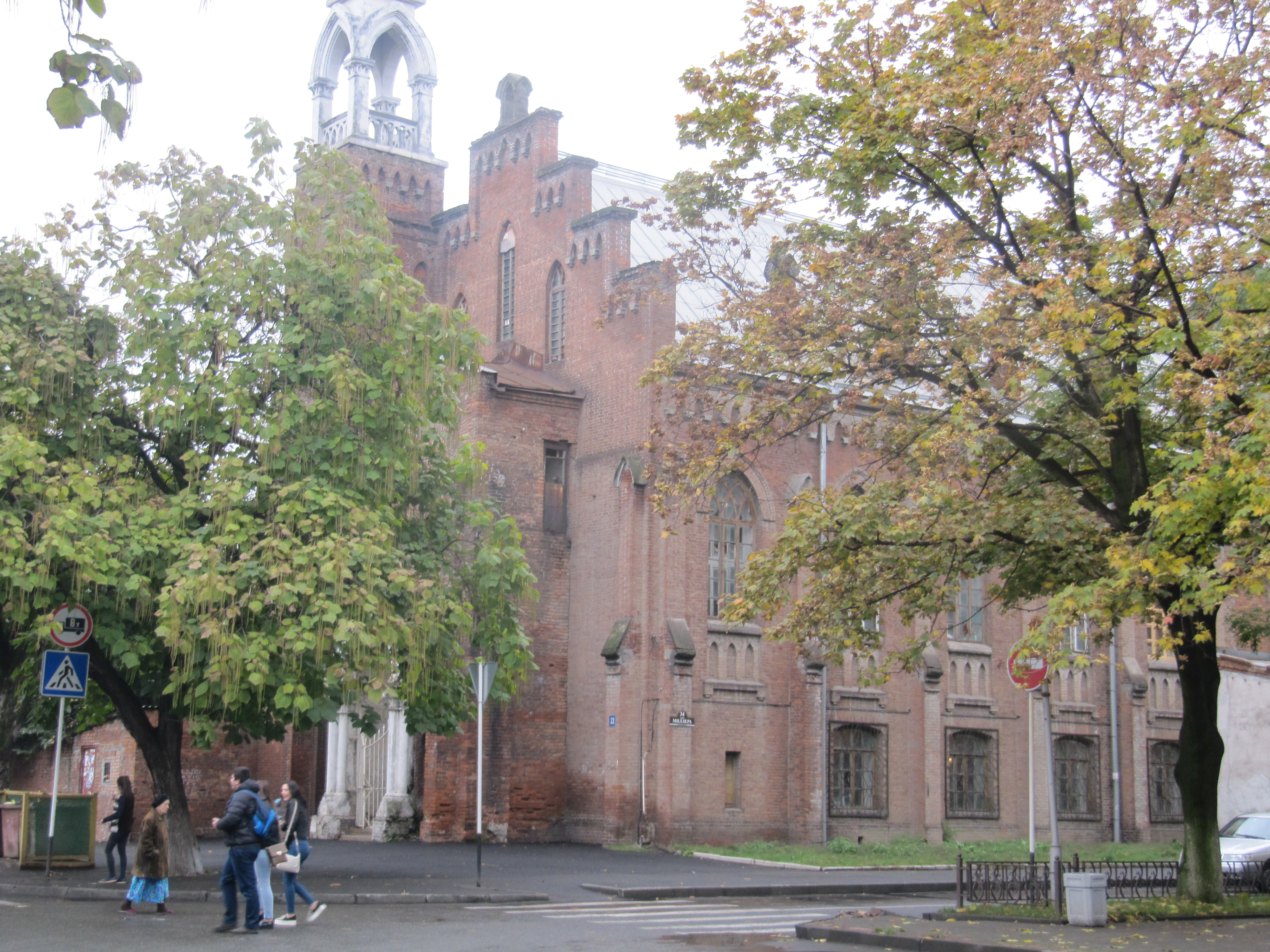 Лютеранская кирха во Владикавказе, Северная Осетия